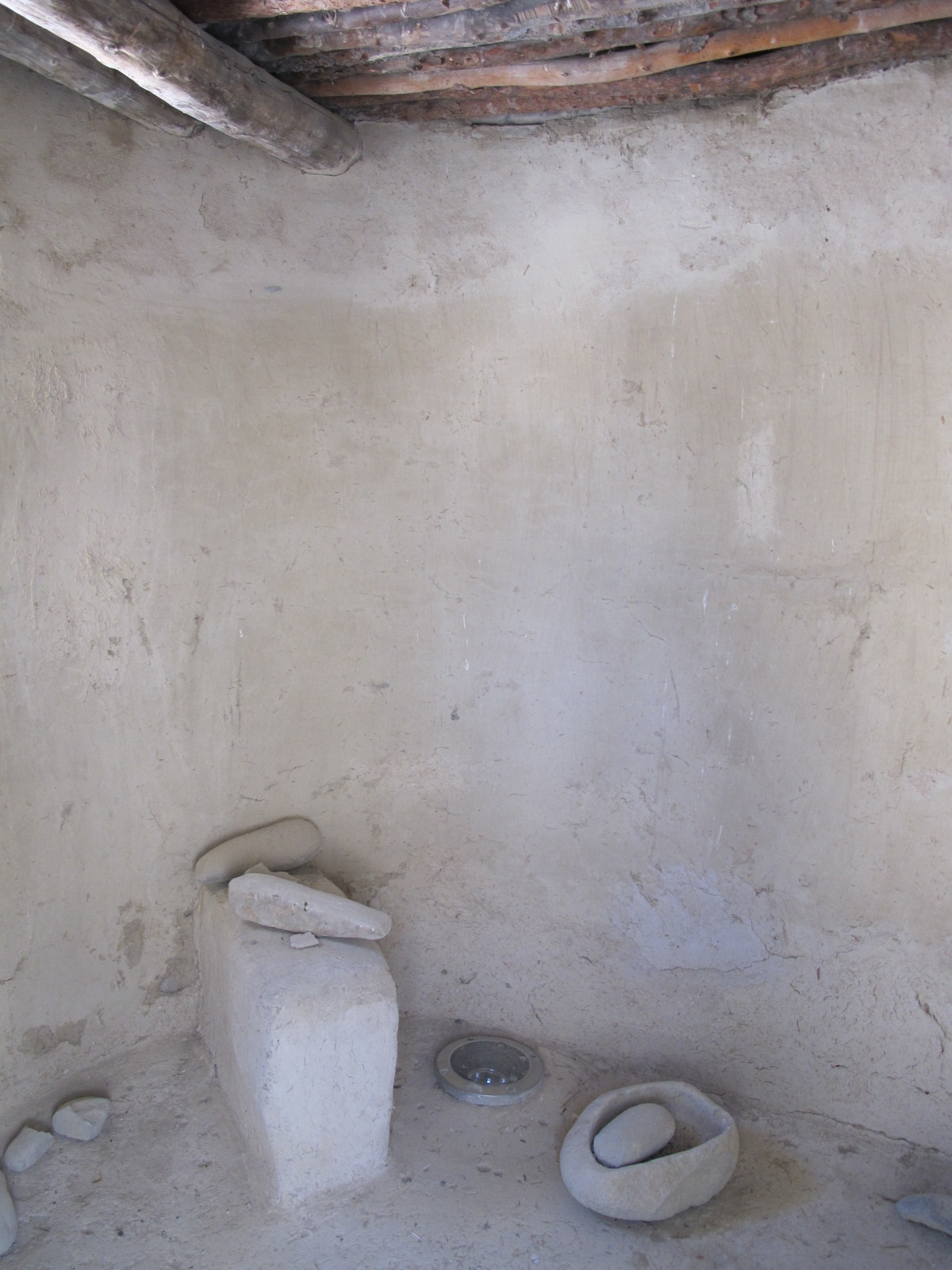 Choirokoitia, Inneres der rekonstruierten Hütten